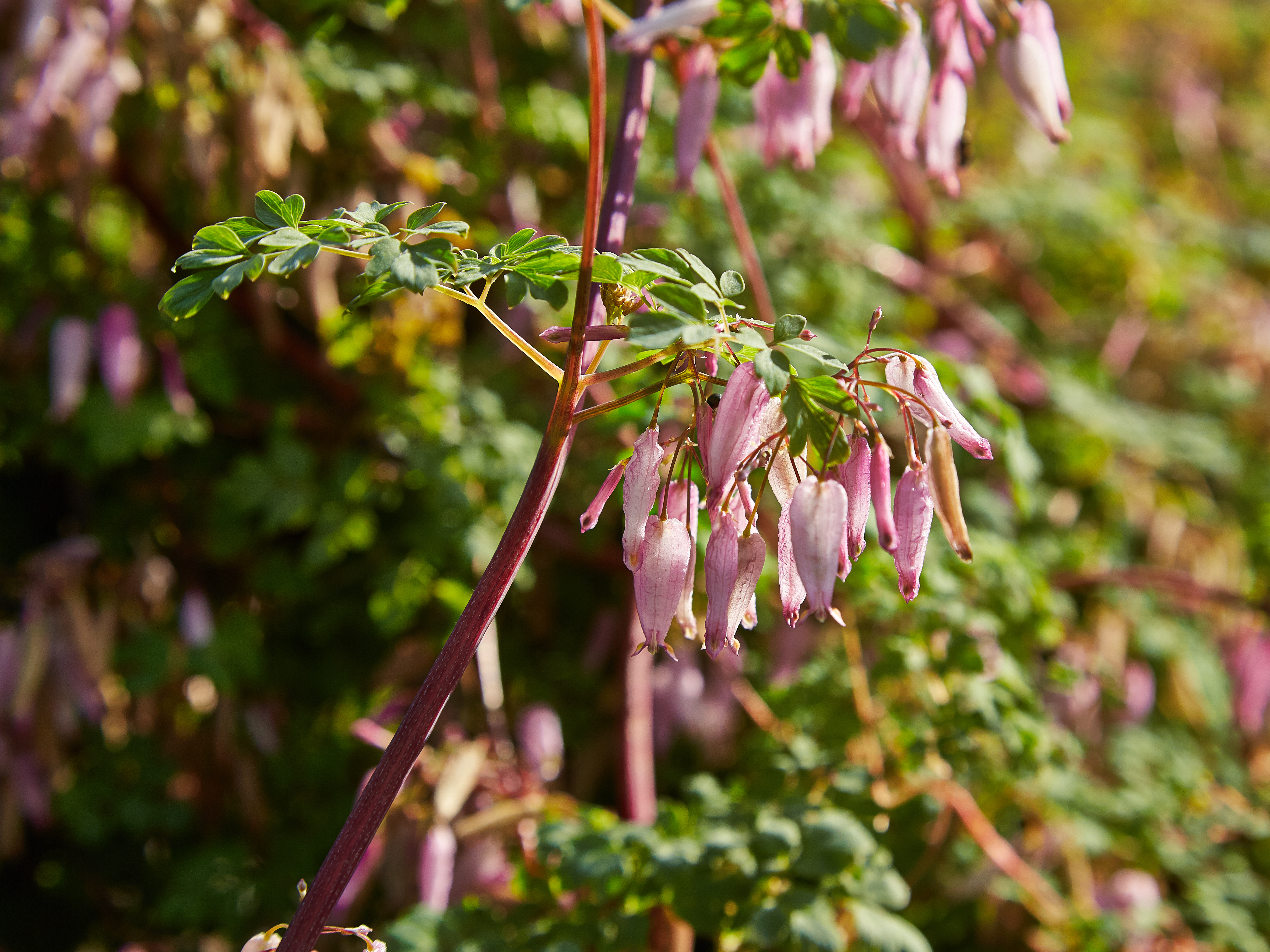 Adlumia fungosa i Bergianska trädgården.